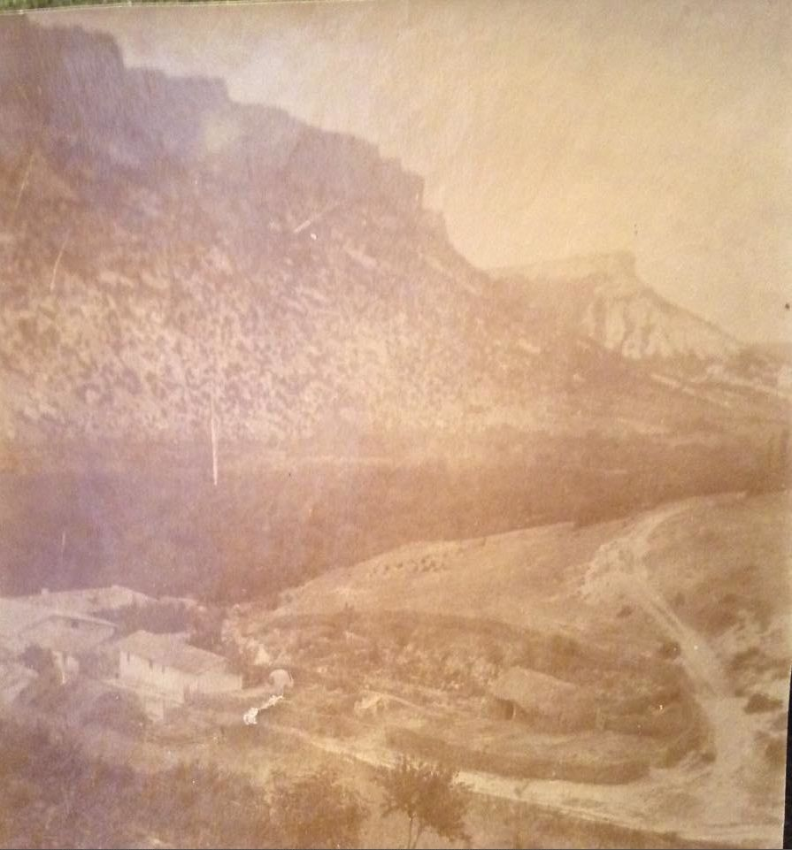 Деревня Пычки, Крым, ок. 1910 года